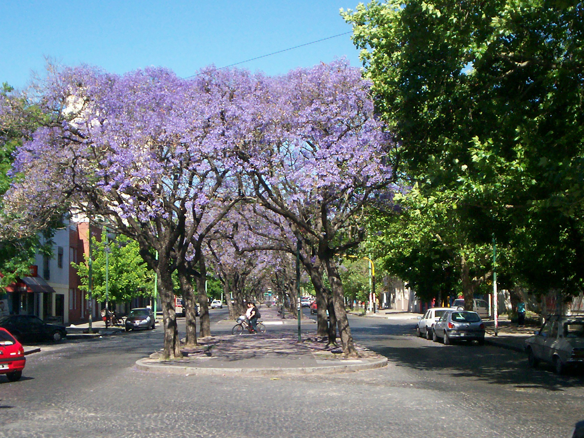 Diagonal 73, en La Plata, Argentina. Vista de los jacarandás. Foto del 25 de noviembre del 2005.